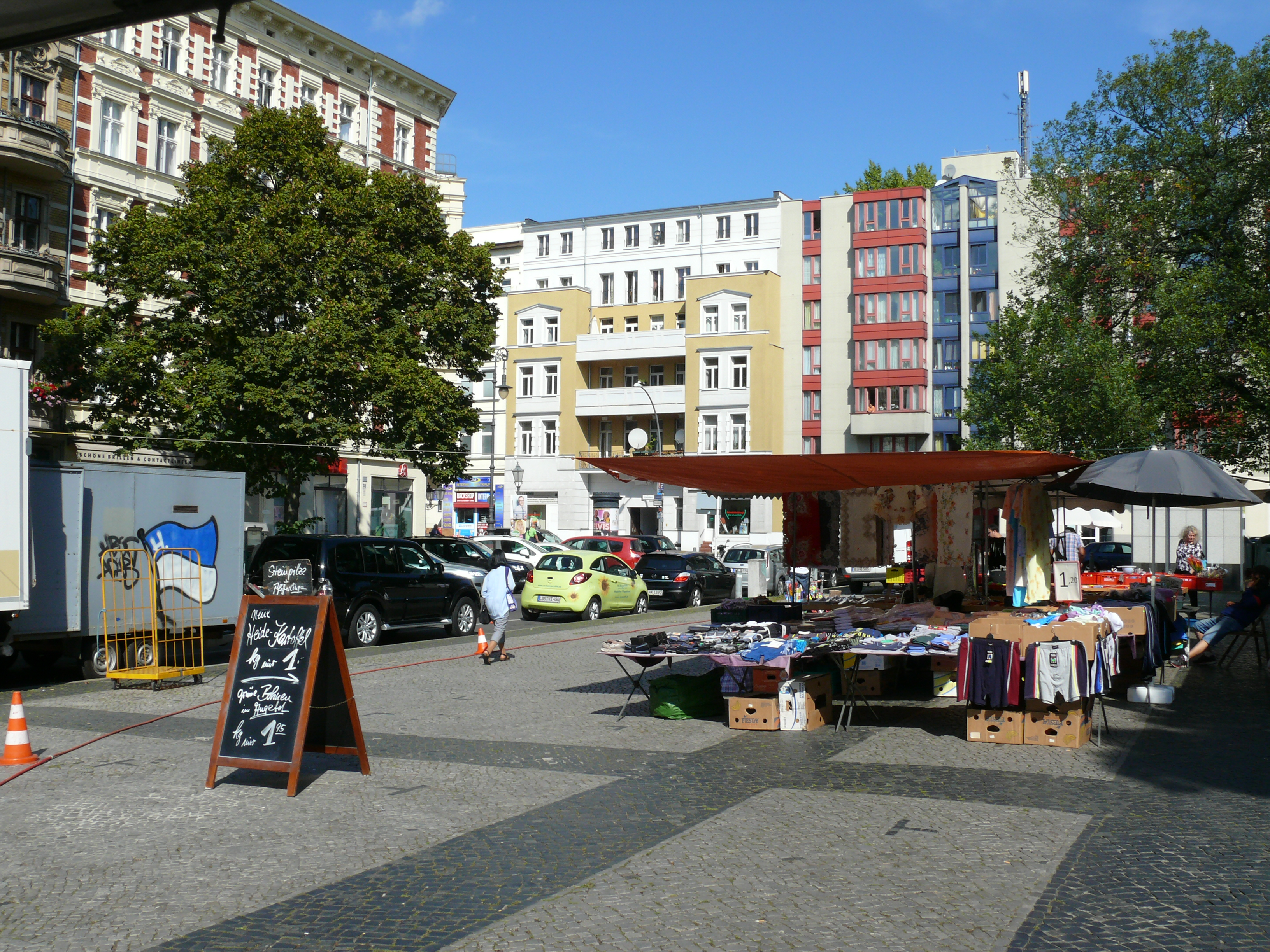 Berlin-Charlottenburg Wochenmarkt Klausenerplatz